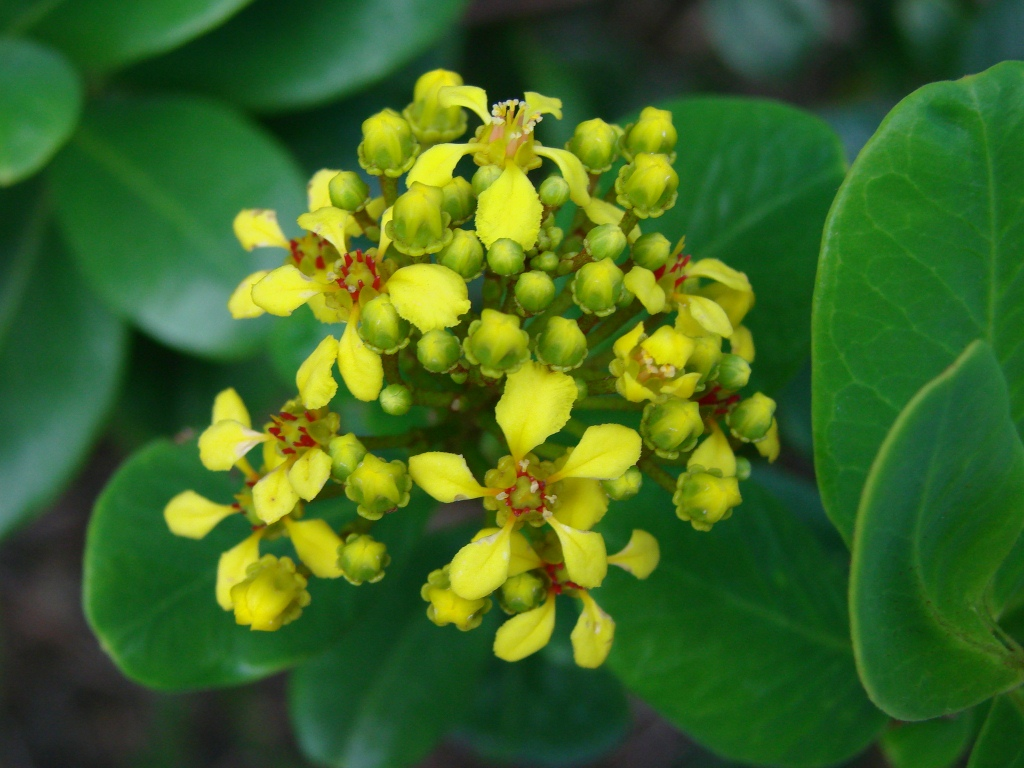 Verrucularia glaucophylla A. Juss. - MALPIGHIACEAE - Parque Natural Municipal Morro do Pai Inácio - Palmeiras - Bahia - Brasil.